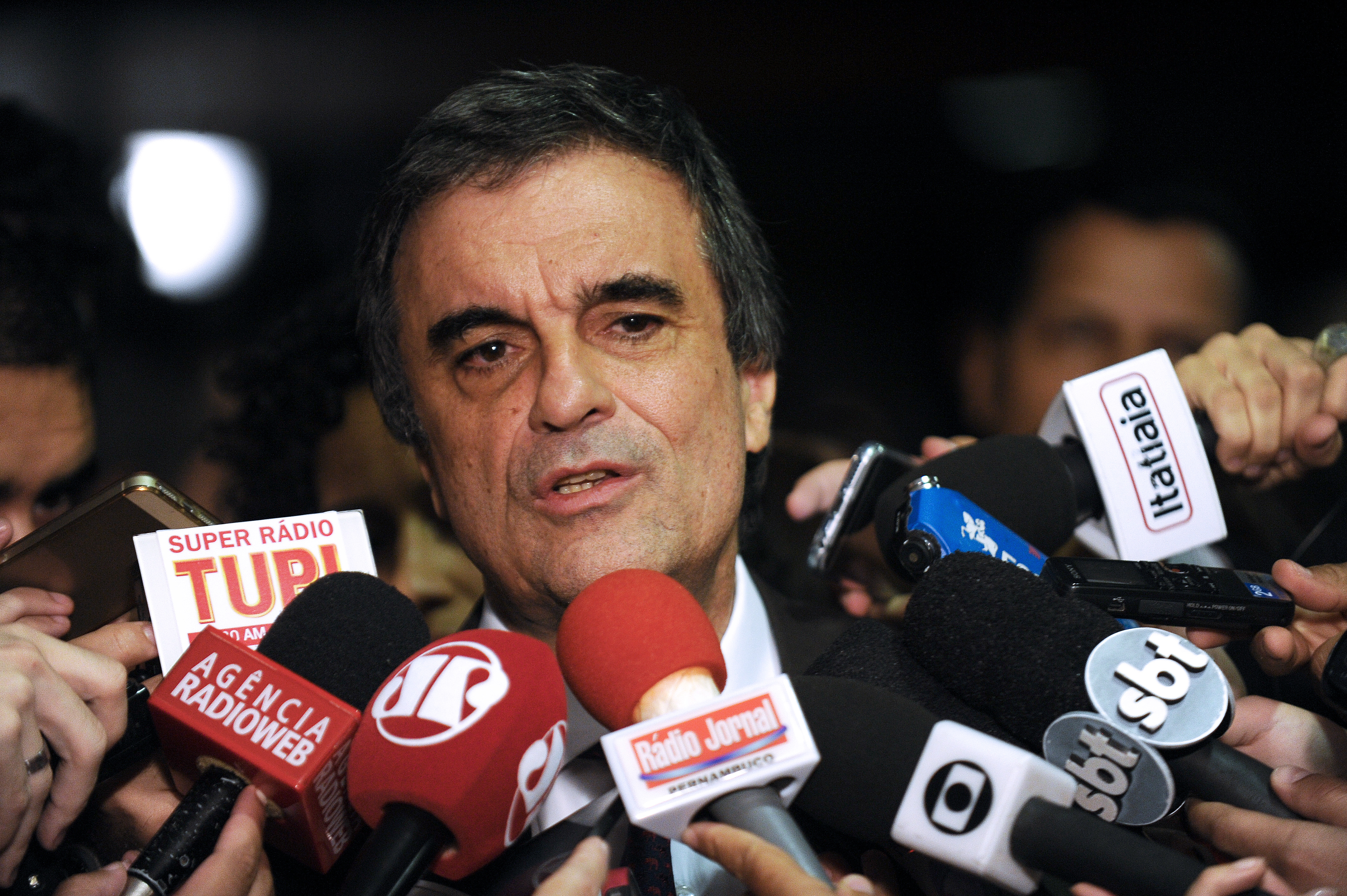 Ministro da Justiça, José Eduardo Cardozo, concede entrevista. Foto: Jefferson Rudy/Agência Senado.